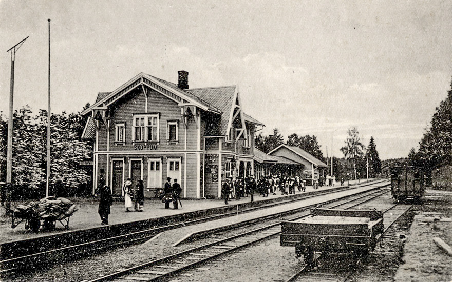 Endret versjon av File:Skoppum stasjon postkort 2.jpg Skoppum stasjon på Vestfoldbanen før 1918